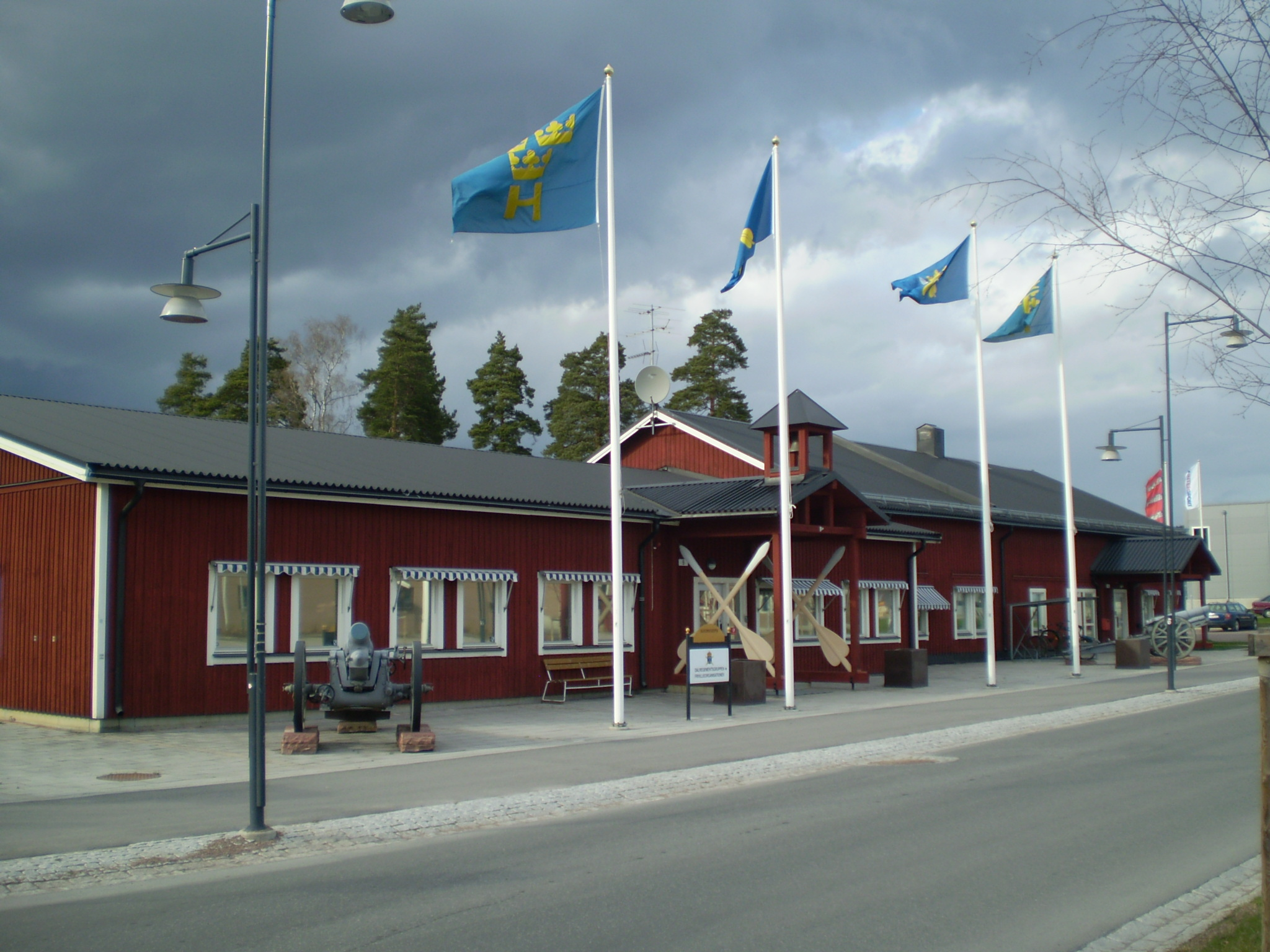 Dalregementsgruppens huvudbyggnad vid före detta Dalregementet i Falun